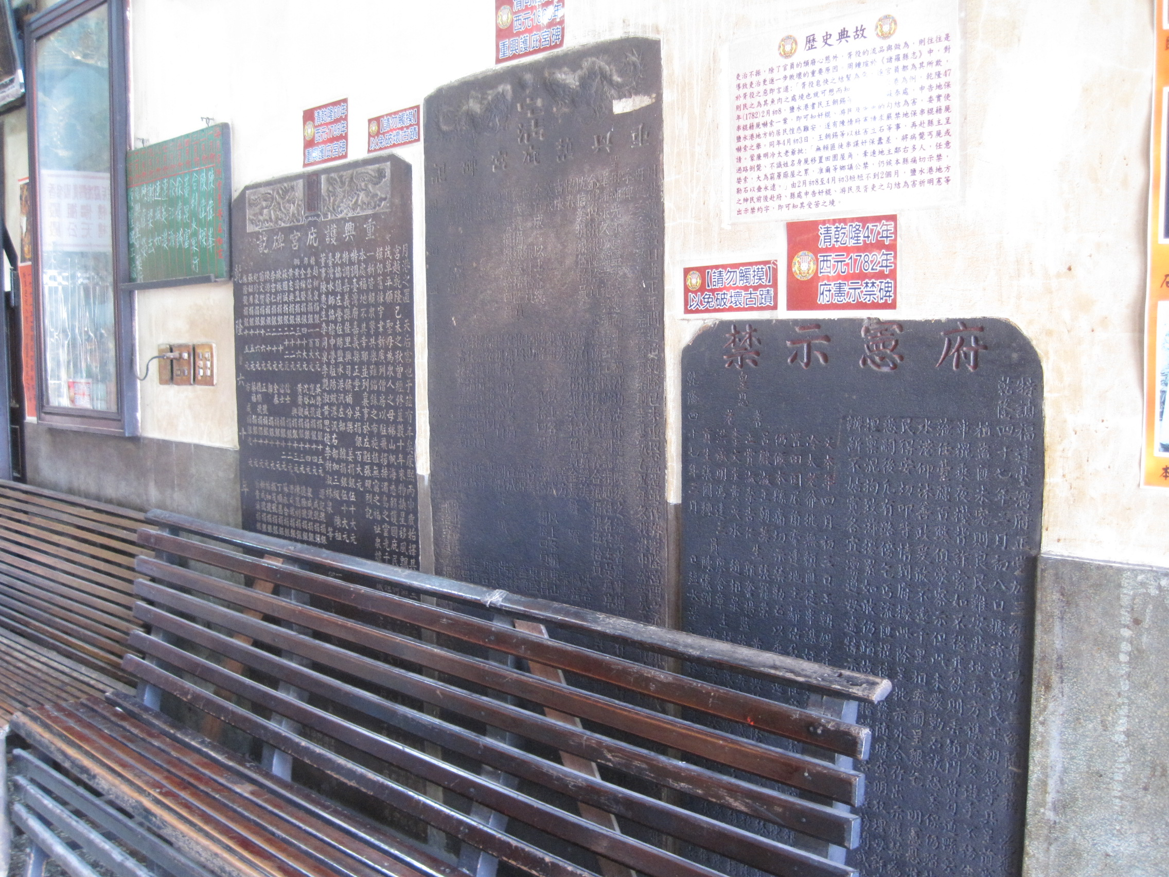 鹽水護庇宮古碑